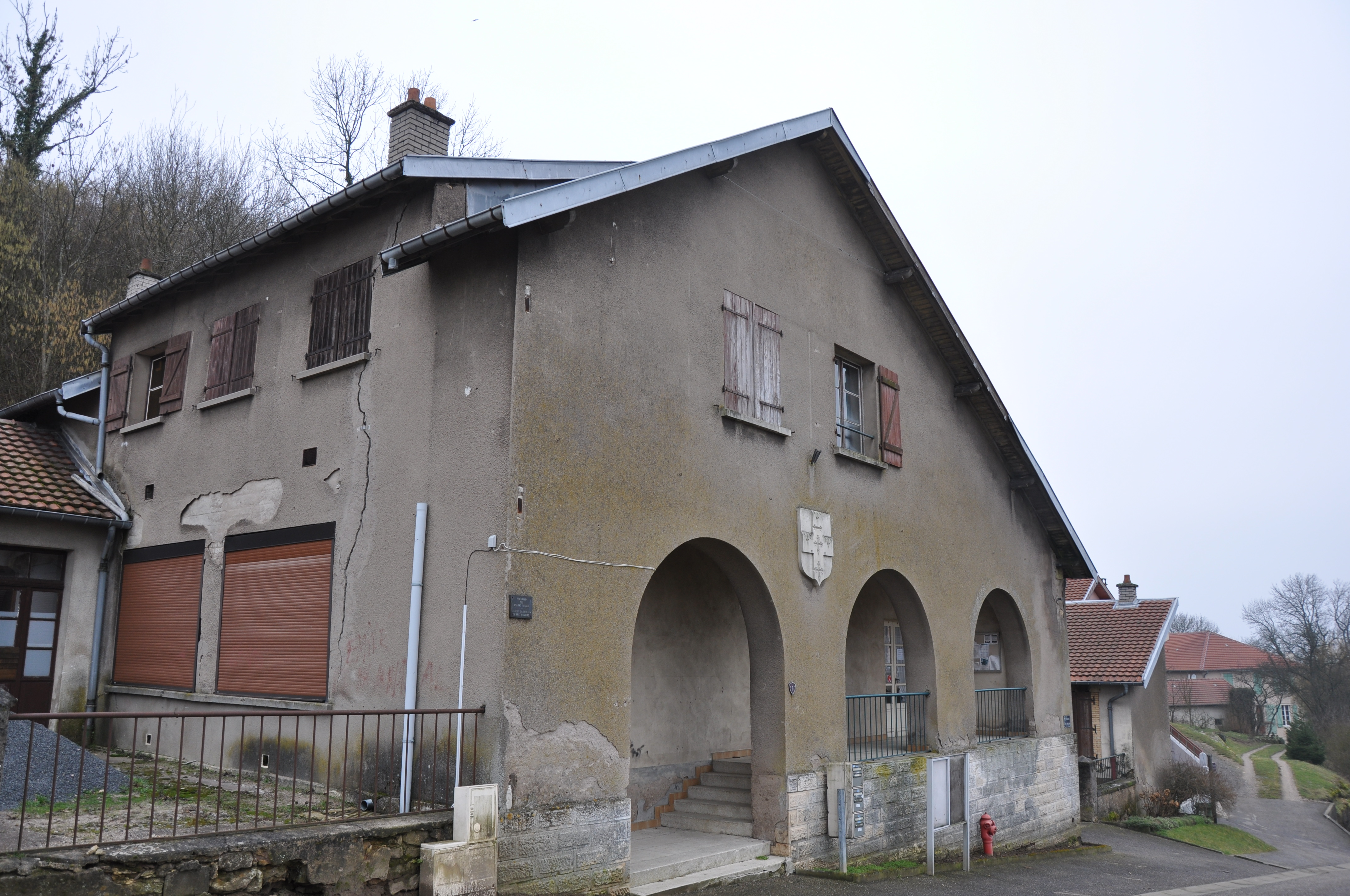 Mairie de Mousson - 6, rue du Général Searby, Mousson, Lorraine, France